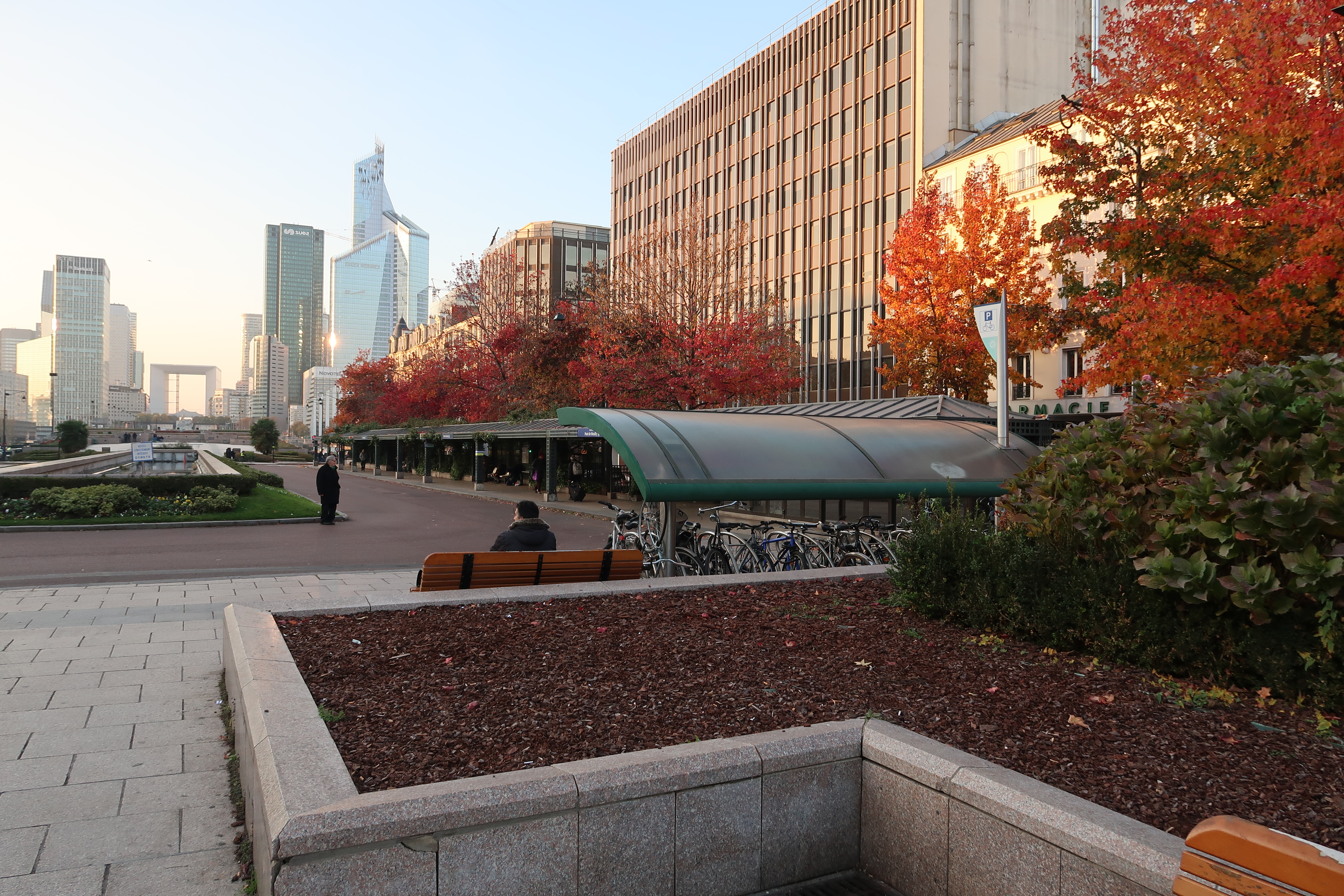 Sortie de la station de métro Pont-de-Neuilly à Neuilly-sur-Seine (Hauts-de-Seine).